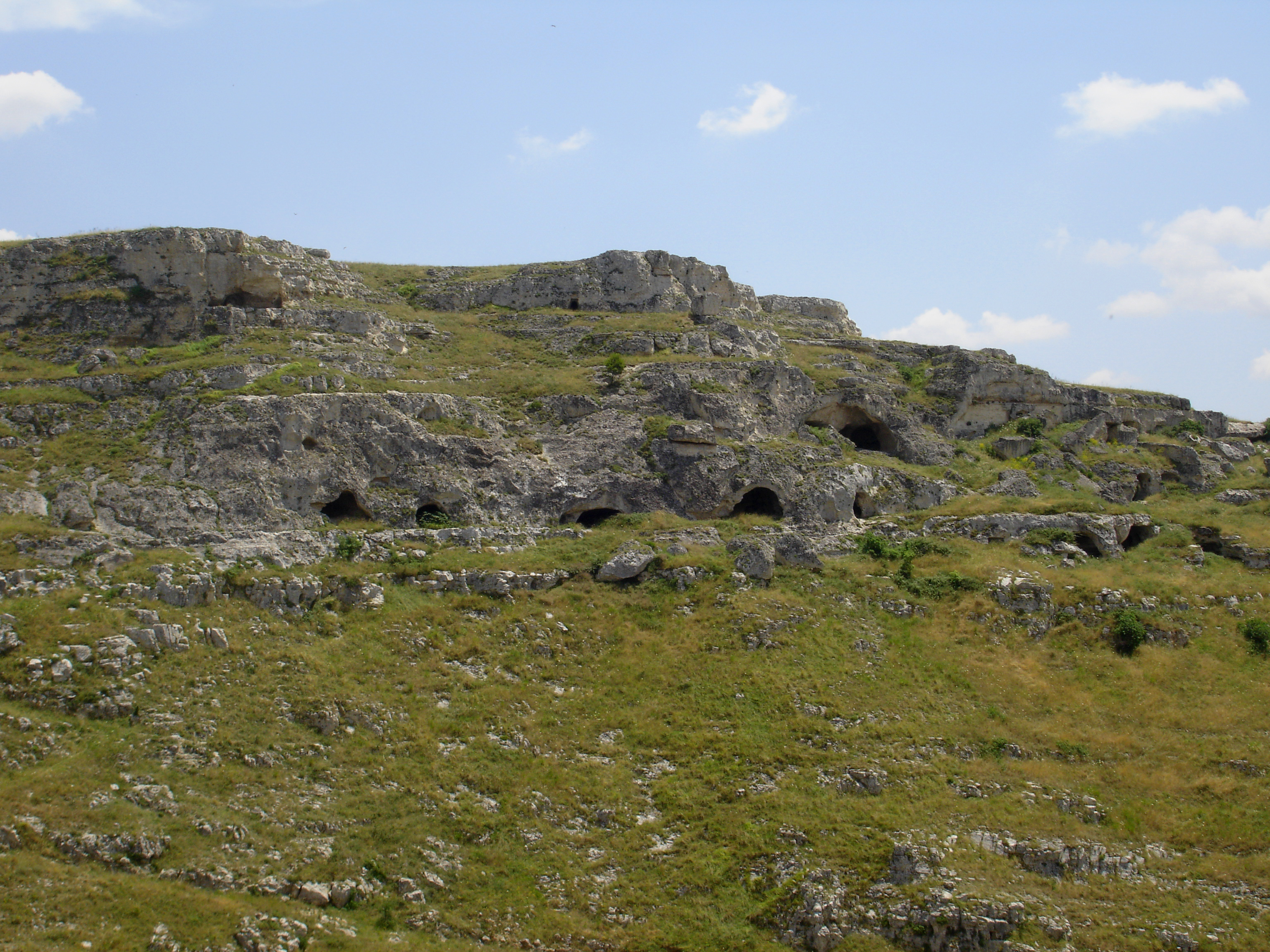 Grotte, abitazioni primitive a Matera